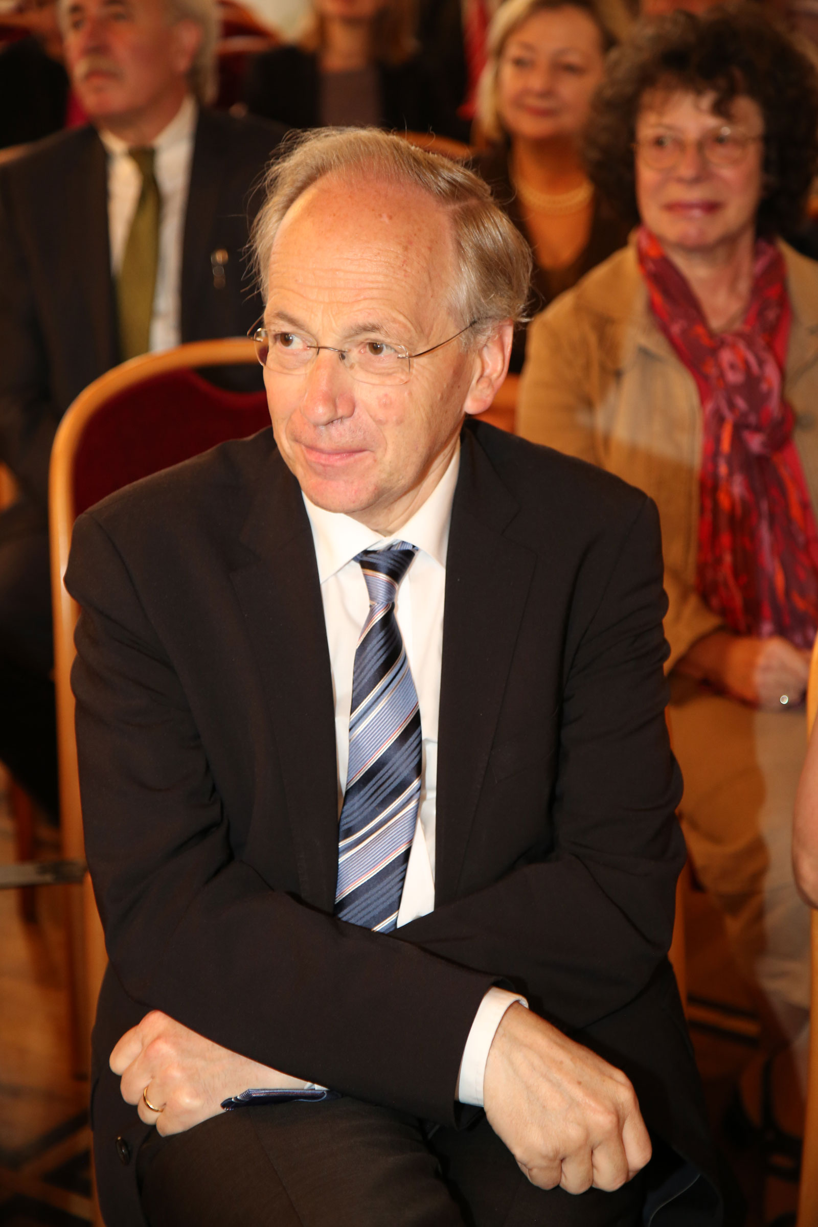 Prof. Rudolf Taschner